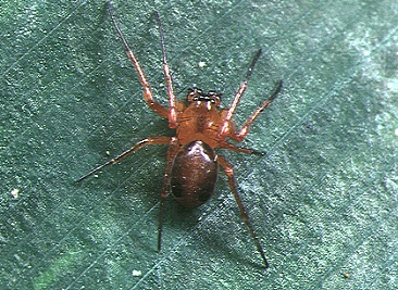 male Hypsosinga sanguinea from Okinawa.